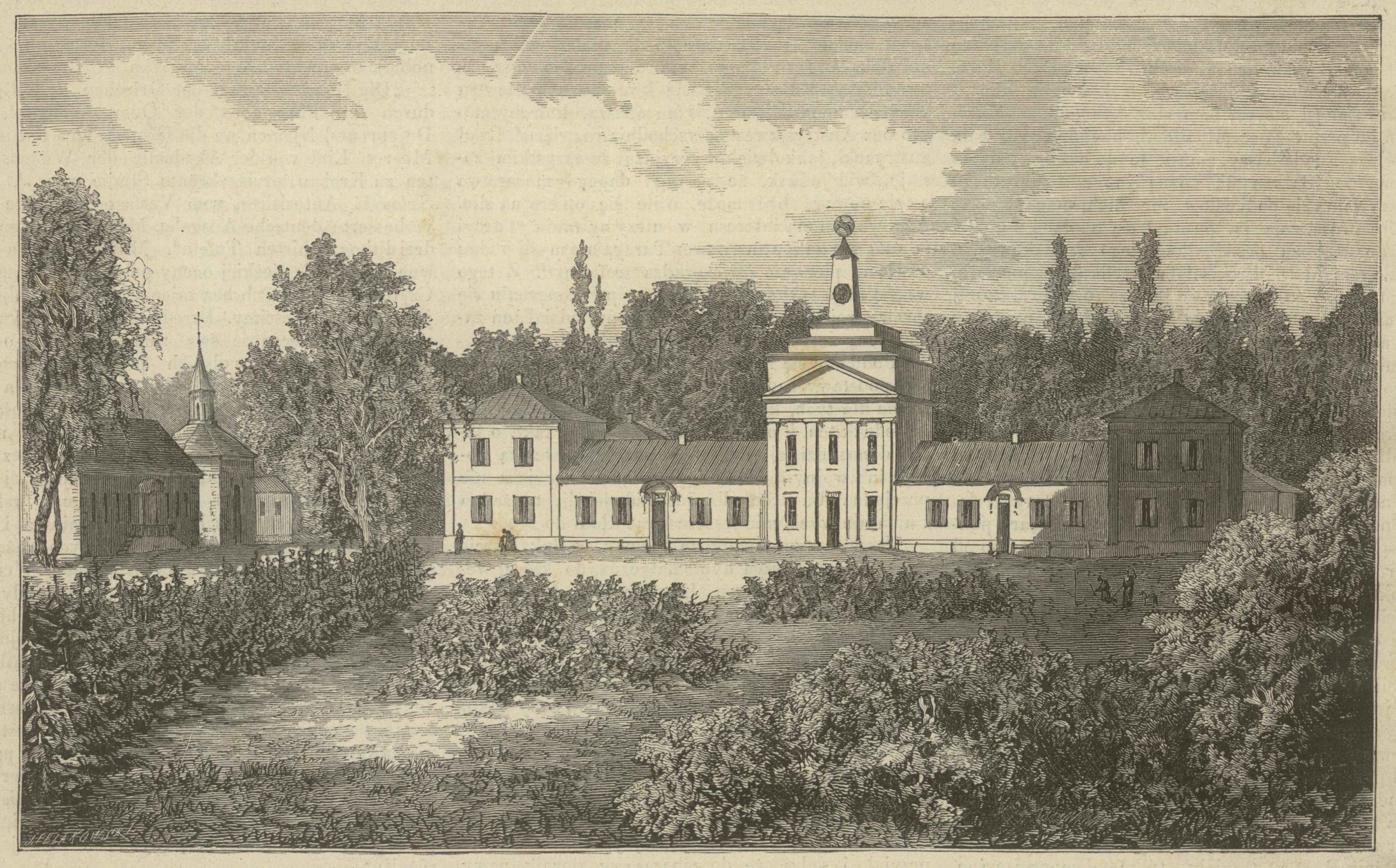 Беларуская (тарашкевіца): Залесьсе (Zaleśsie), сядзіба Агінскіх (Aginski)